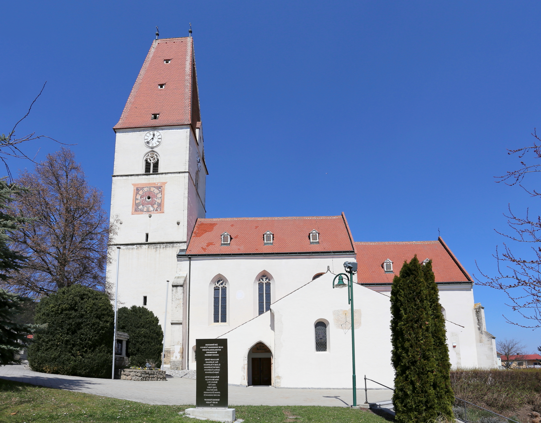 Katholische Pfarrkirche hl. Johannes der Täufer in der niederösterreichischen Marktgemeinde Nußdorf ob der Traisen. Ein zweischiffiger spätgotischer Sakralbau mit Westturm und einem klar abgesetzten Rechteckchor aus dem 14. Jahrhundert. Davor (in Spiegelschrift) das Mahnmal für die Opfer des Nationalsozialismus.